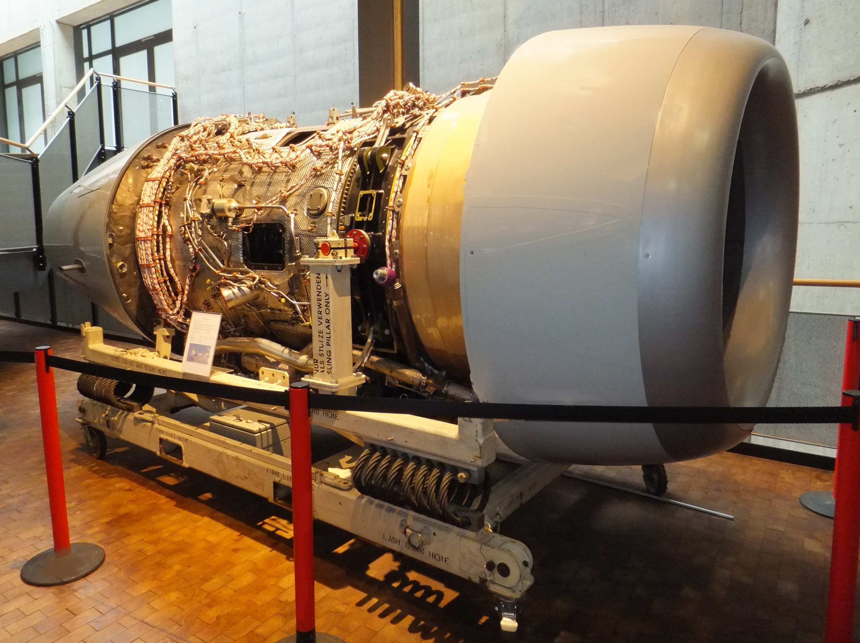 Ein Prototyp des BMW Rolls-Royce BR700 im Technikmuseum Berlin.